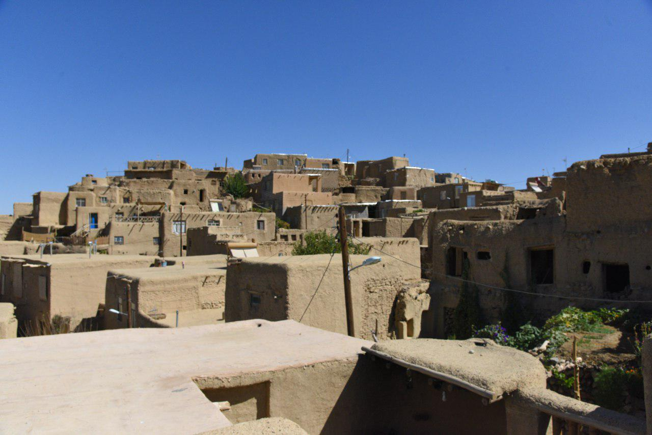 روستای قلعه بالا